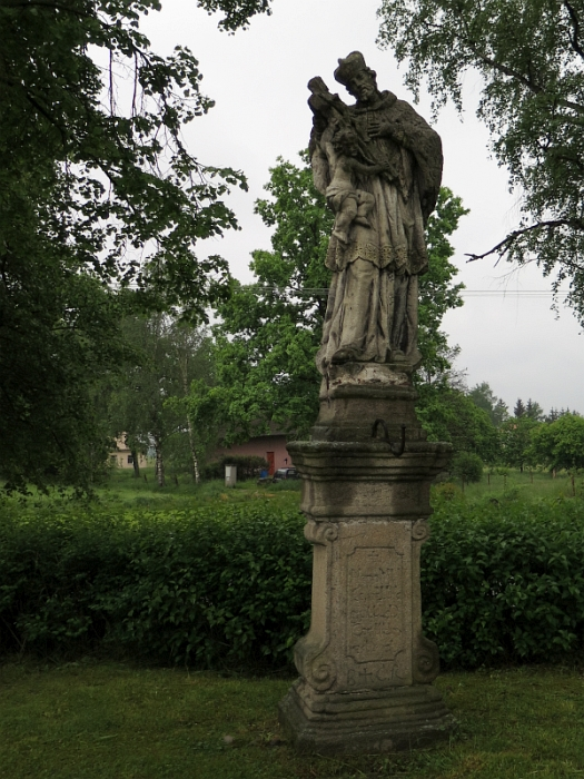 Socha svatého Jana Nepomuckého, park na křižovatce cest Třeboň - Kojákovice - Petrovice, Mladošovice.